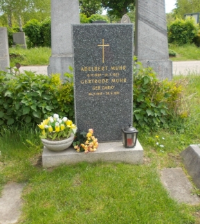 Wiener Zentralfriedhof-Adalbert Muhr